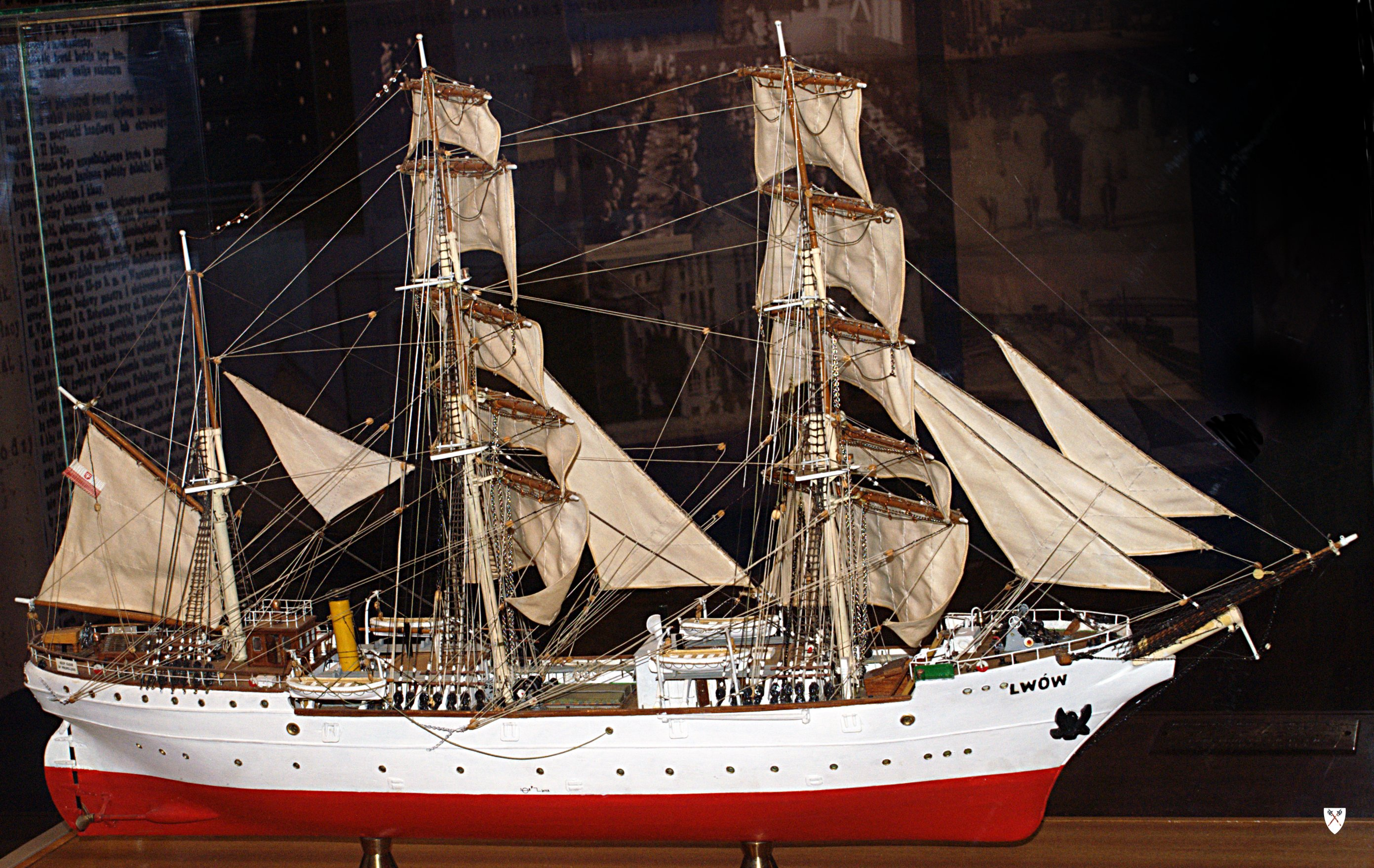 Model statku Lwów w Muzeum Wisły. Model w skali 1:100 wykonał kpt. ż. w. Mieczysław Markiewicz.